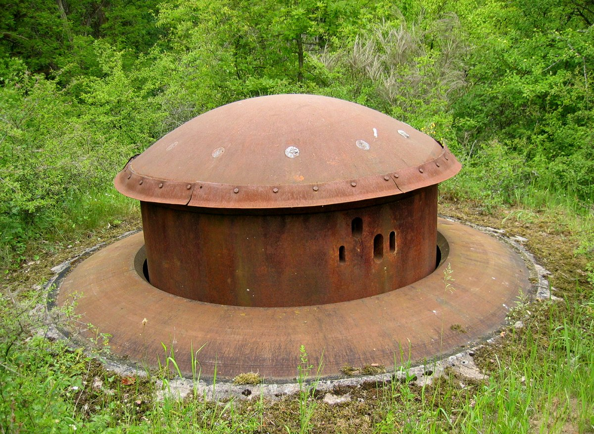 Ligne Maginot - Petit Ouvrage Oberheide - Tourelle mitrailleuse